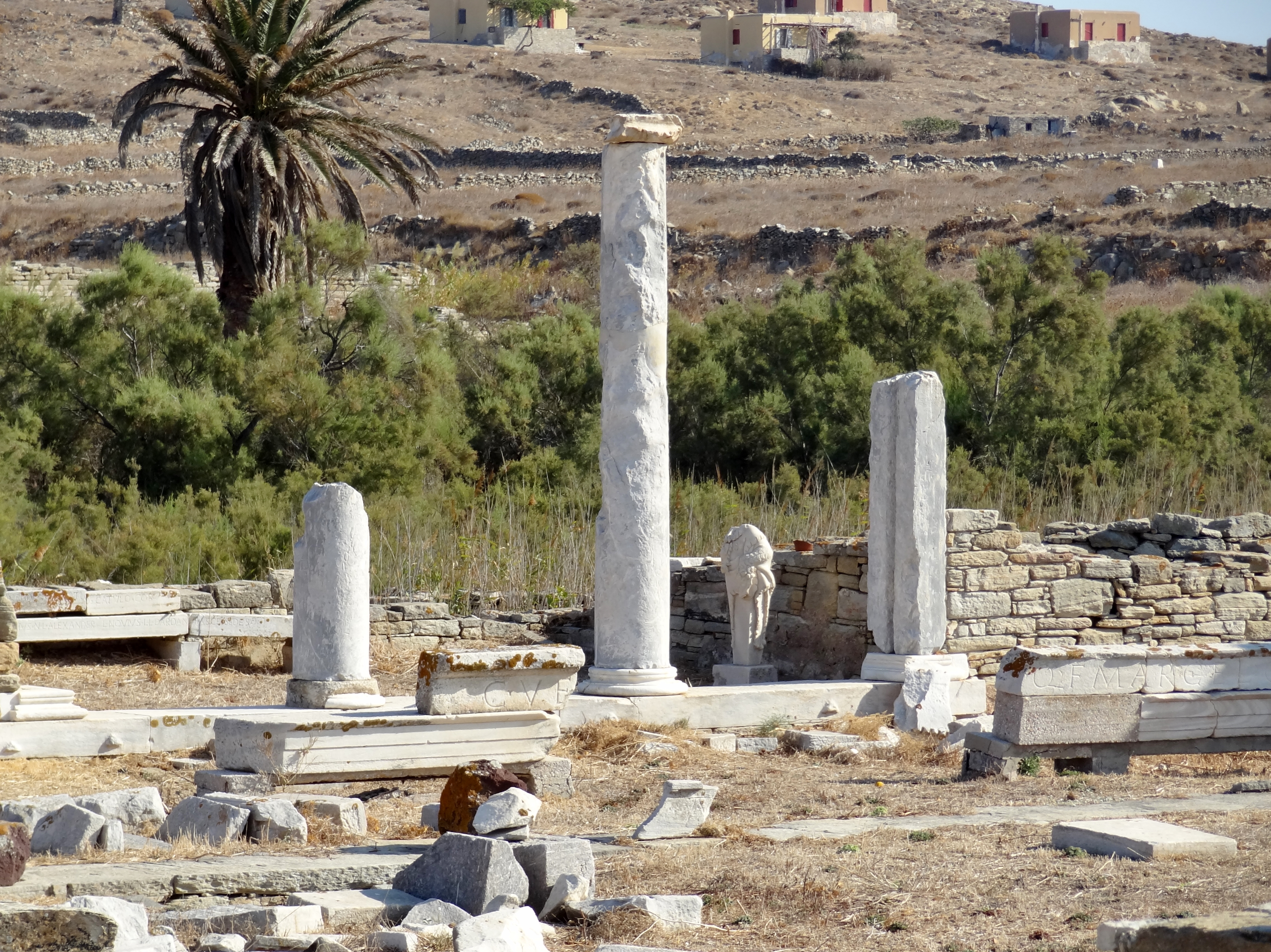 Agora der Italiker nahe dem Heiligen See der Ausgrabungsstätte von Delos, Kykladen, Griechenland